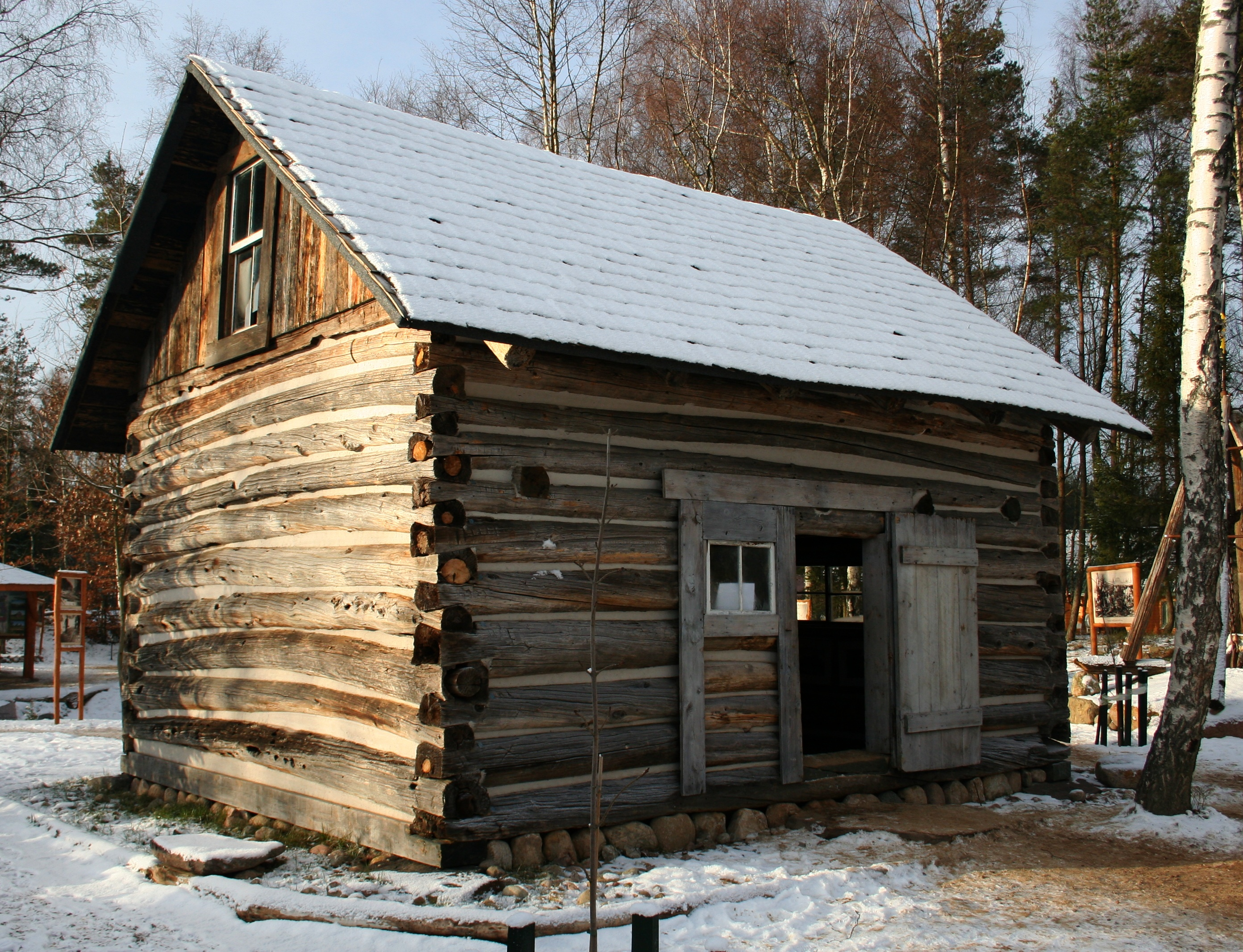 Szymbark, chata traperów